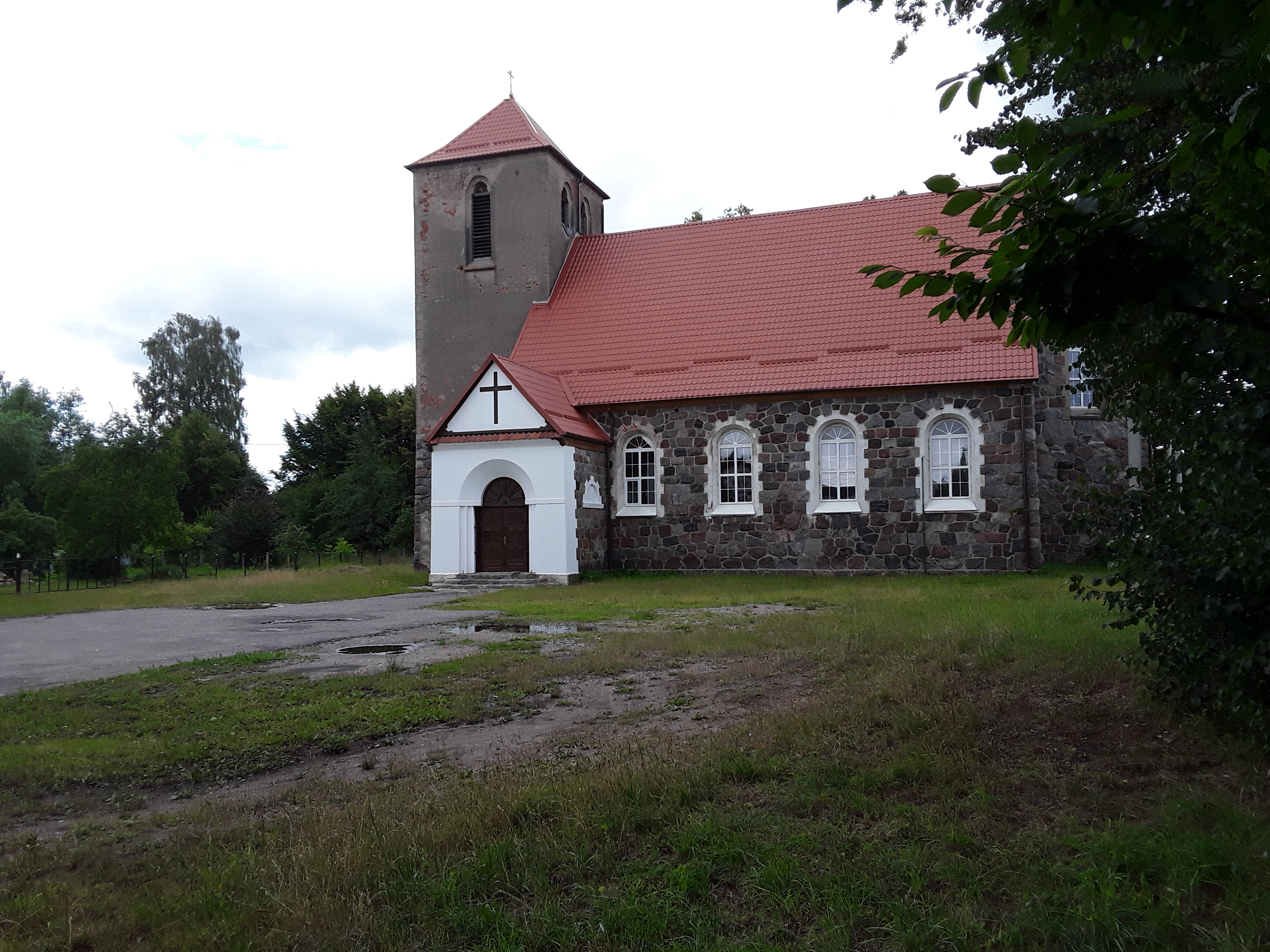 Groß Baum, evangelische Kirche